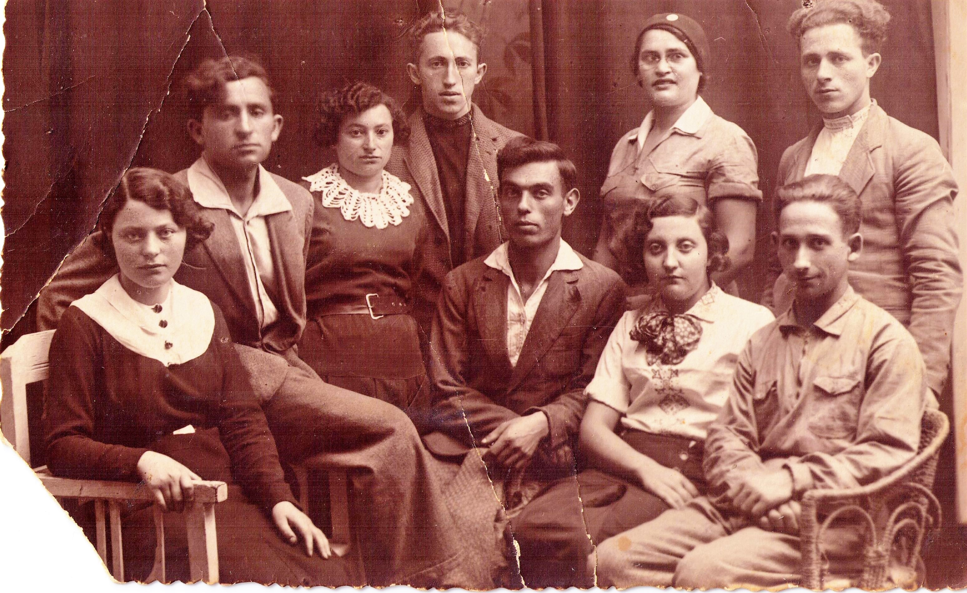 חלוצים בדרך לחחת ההכשרה בפולחן קיבוץ ברוכוב